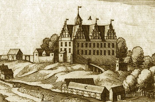 Zamek w Drawnie - fragment panoramy Drawna; autor: Matthäus Merian